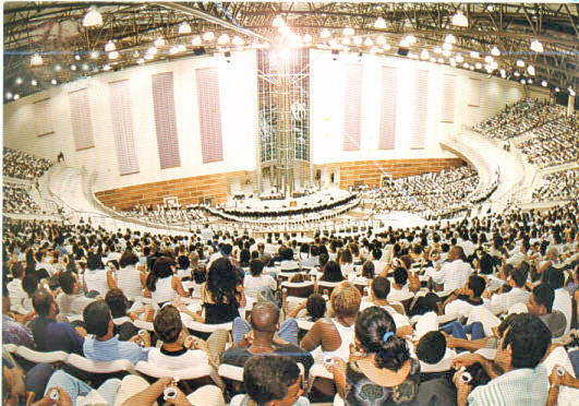 Culto, Catedral Mundial da Fé, Rio de Janeiro